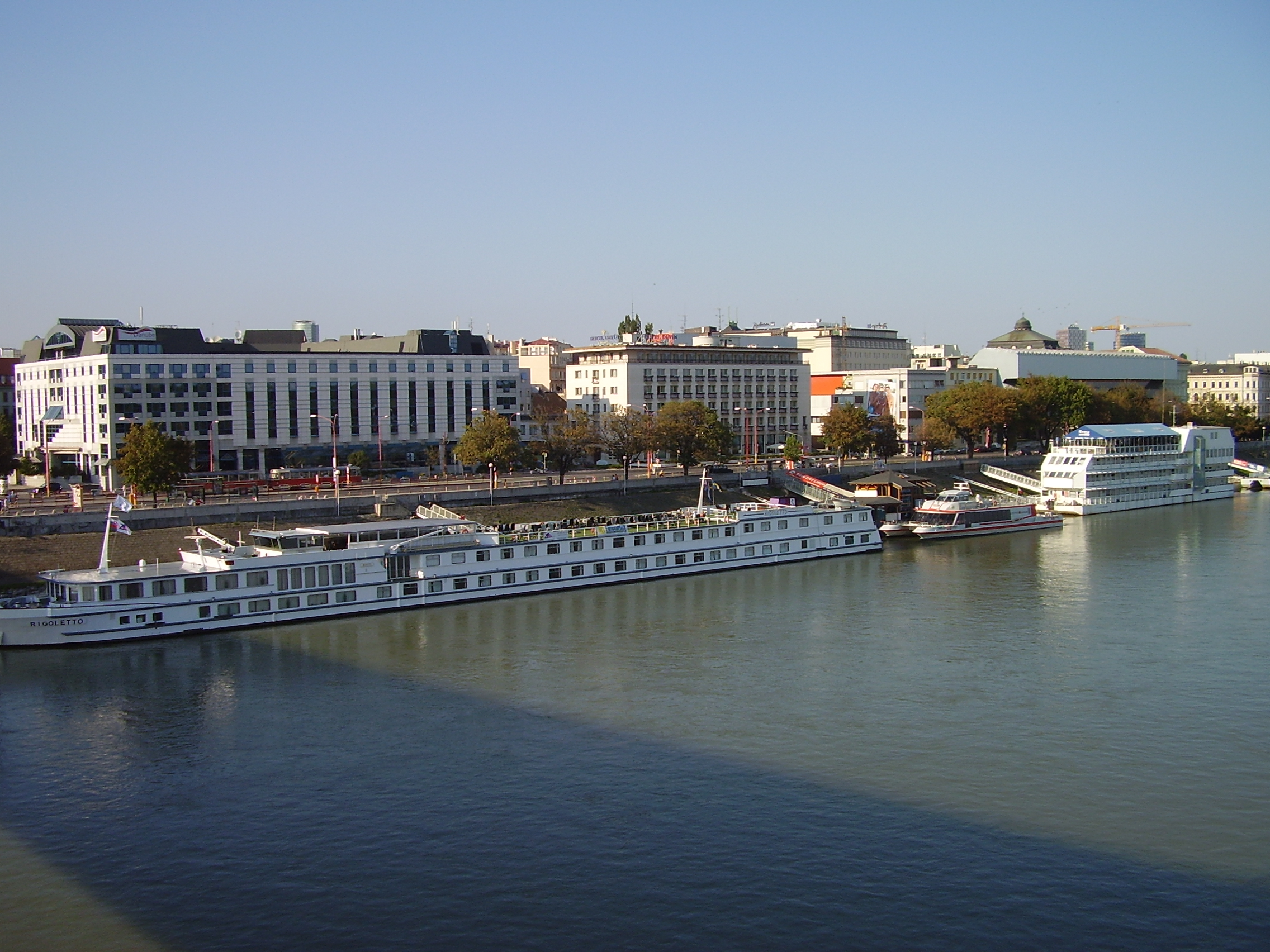 Bratislava